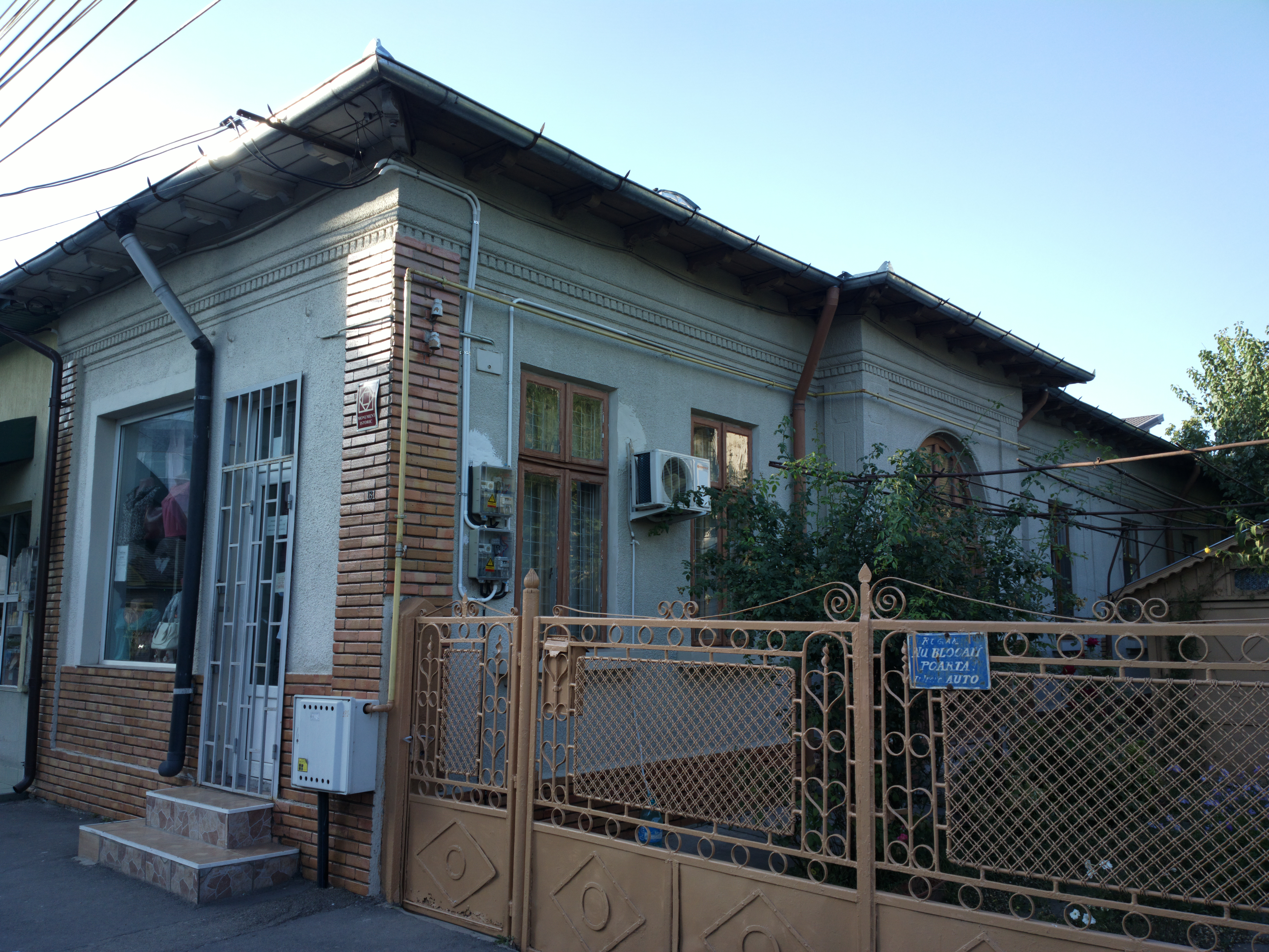 Casă calea Bucuresti 181